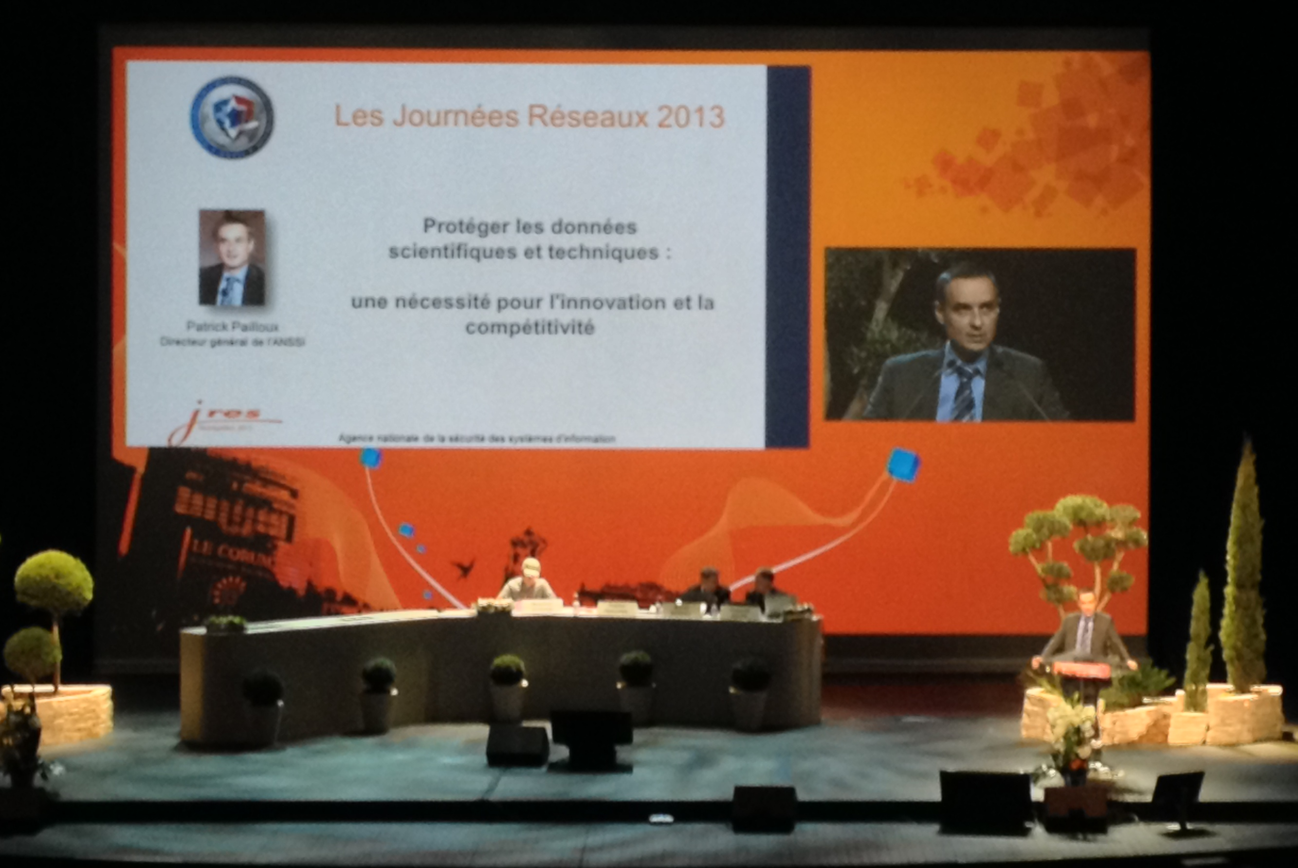 Directeur général de l'Agence nationale de la sécurité des systèmes d'information.